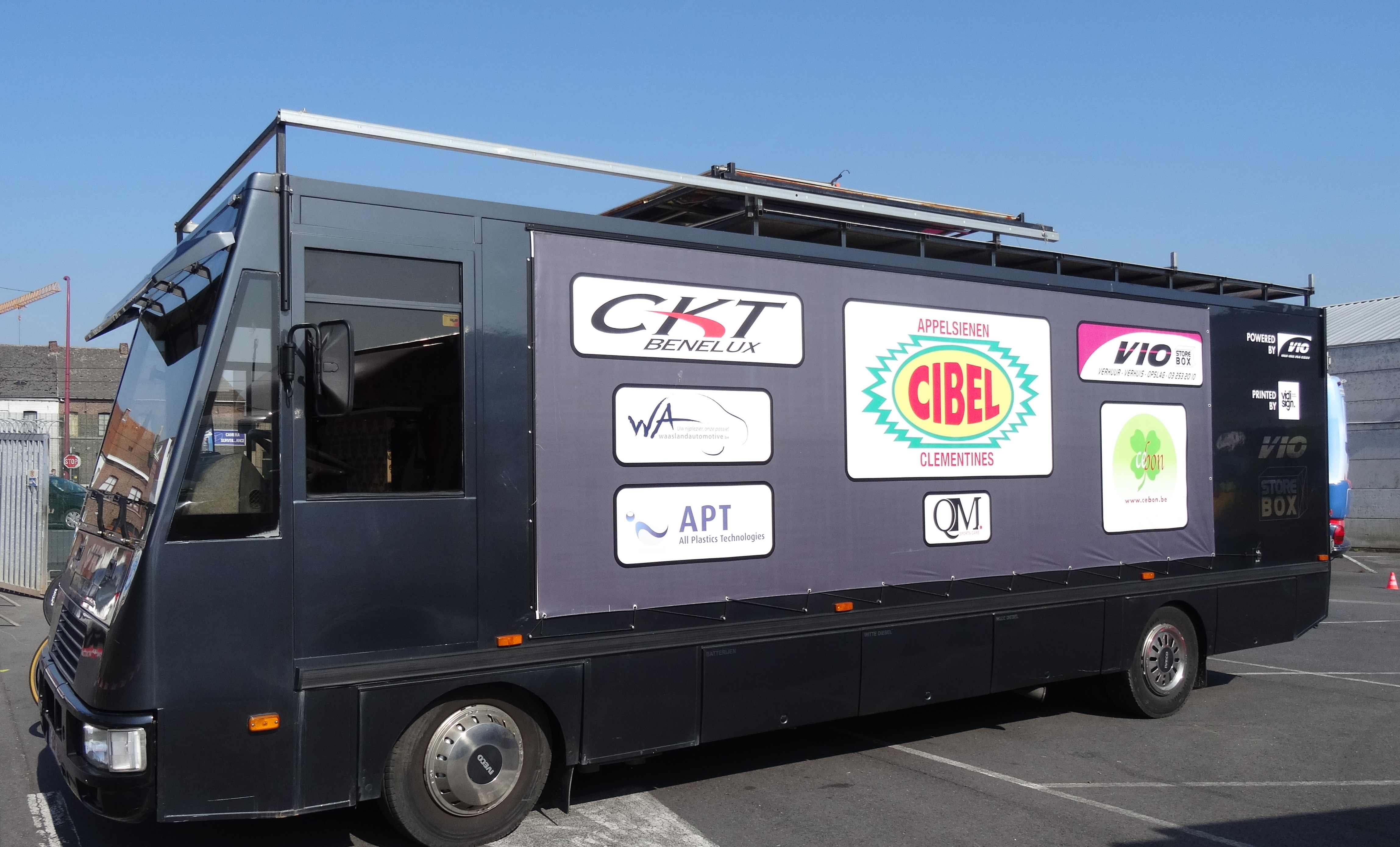 Reportage réalisé le samedi 17 mai à l'occasion du départ du Grand Prix Criquielion 2014 à Boussu, Belgique.